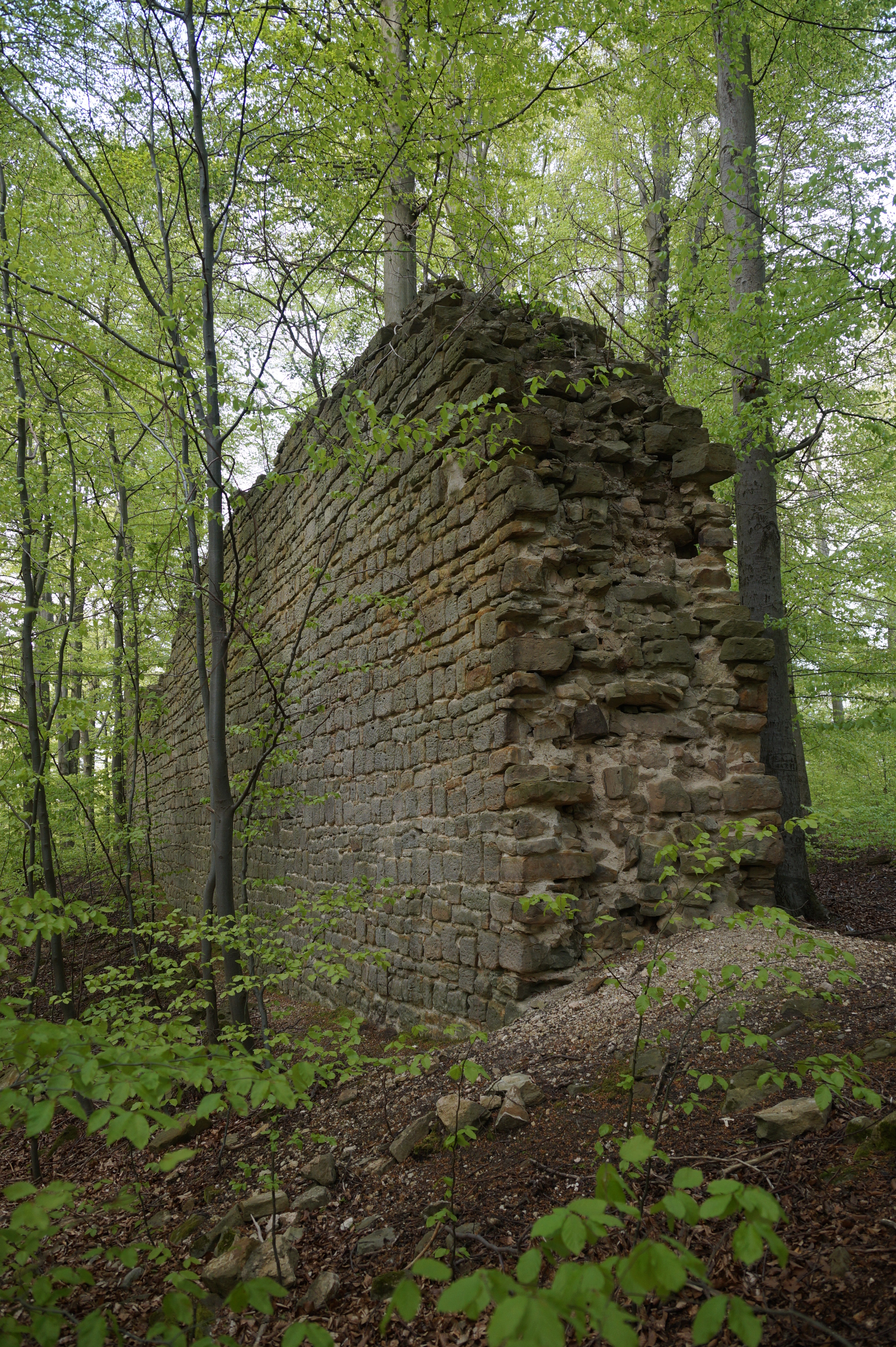 Reste der westlichen Wehrmauer der Burgruine Rabenswalde